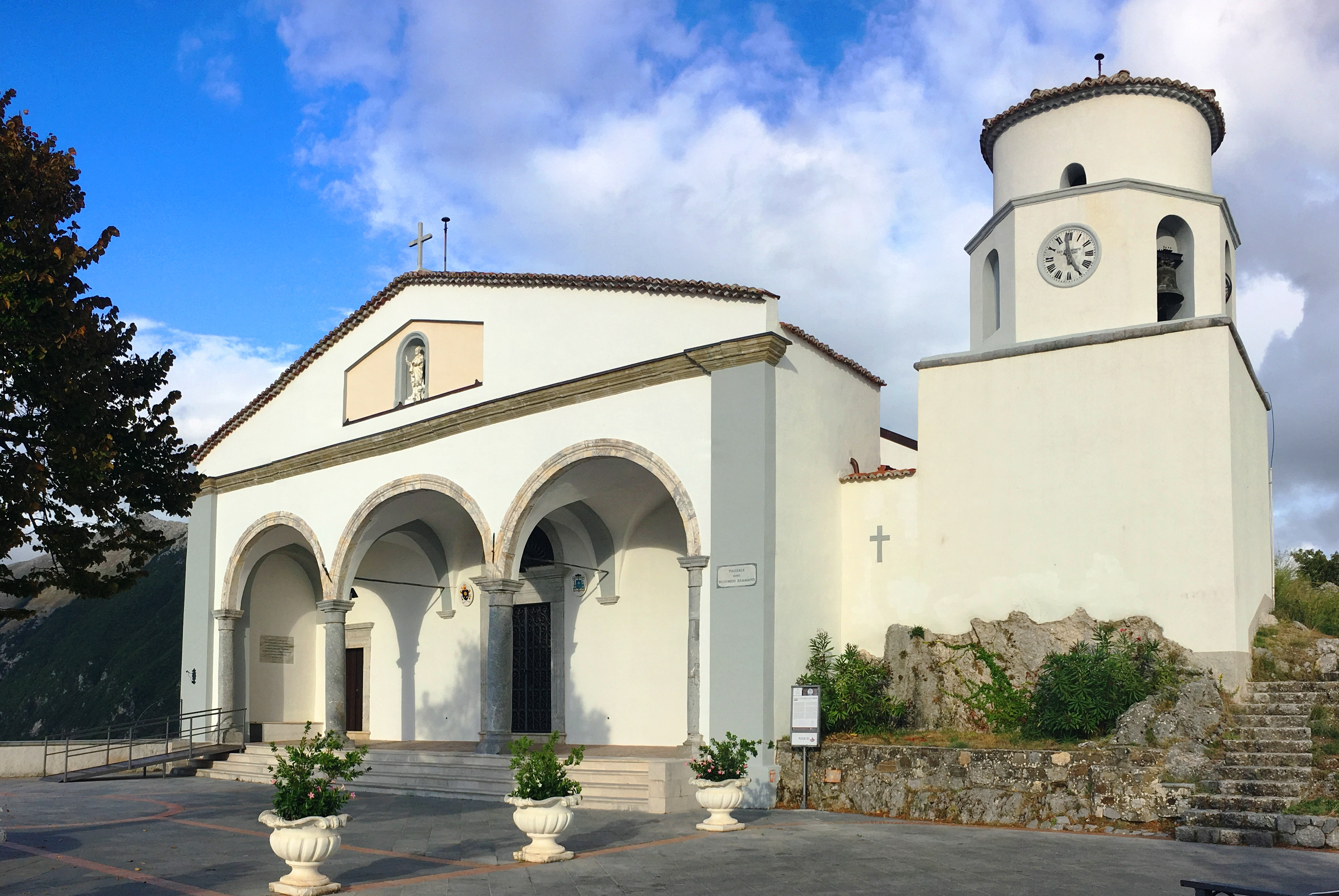 Autore: Luca Luongo Descrizione: Basilica di Maratea Licenza: Ente di proteziome: Ass. Beni Culturali della Basilicata